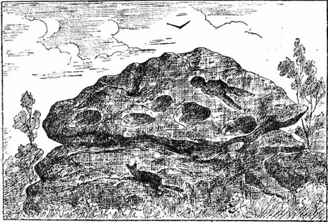 Dessin de Honoré Jacquinot de 1886, paru dans les Bulletins de la Société d'anthropologie de Paris et représentant la Pâture Lazare à Saint-Agnan (Nièvre, France)